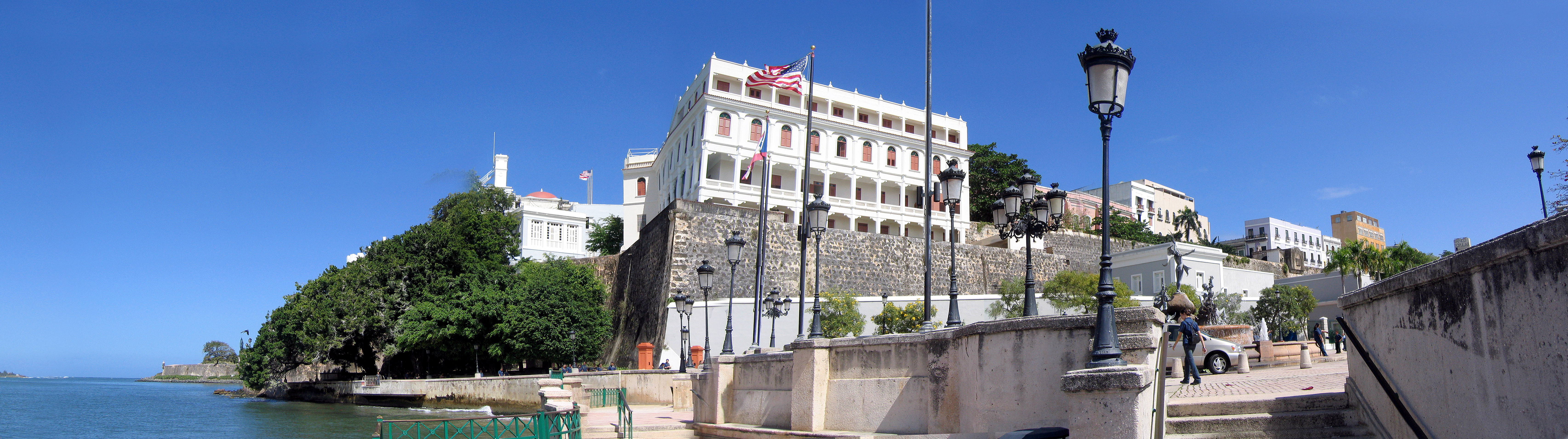 San Juan. Paseo de la Princesa. Puerto Rico, 2004